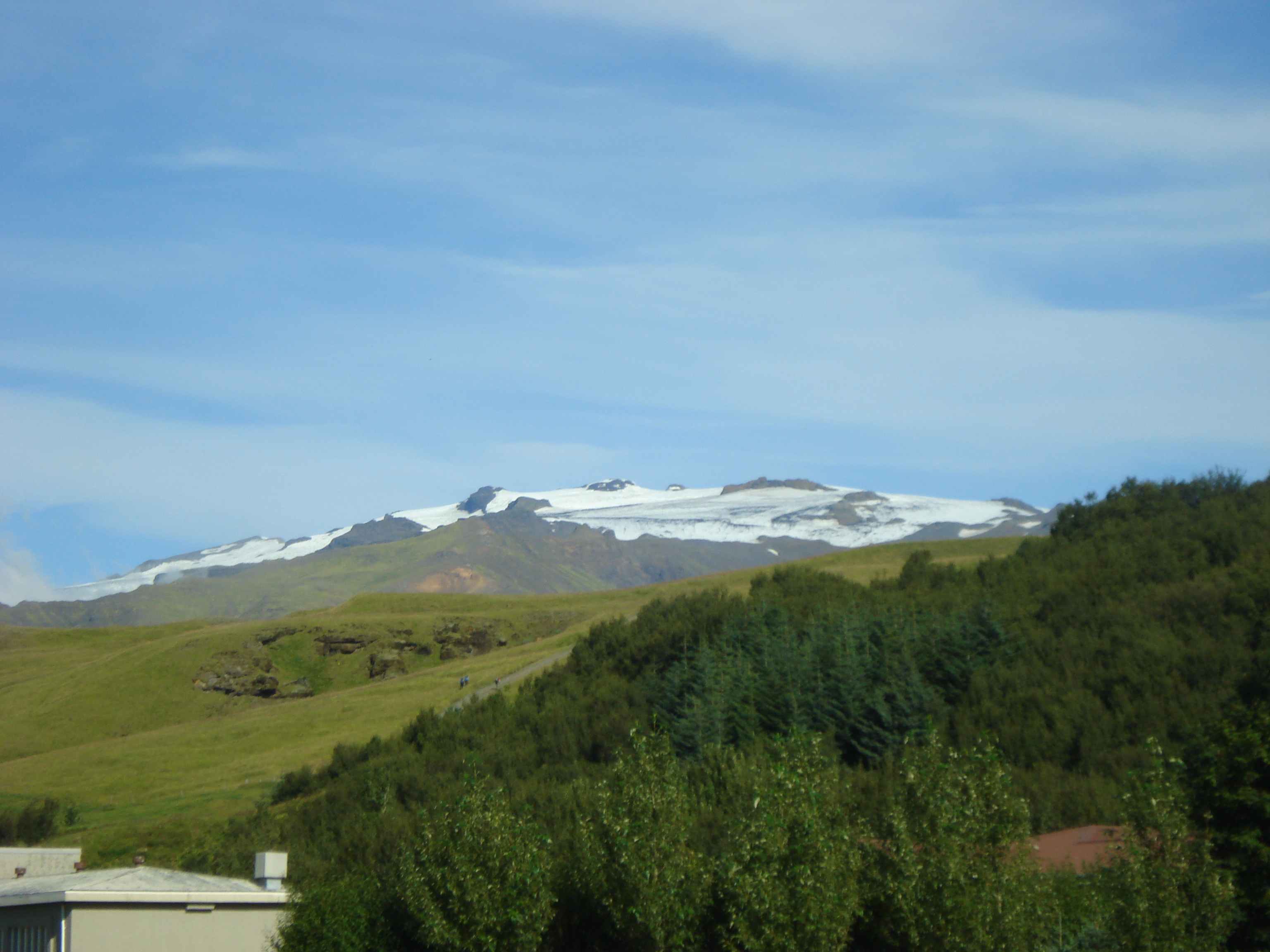 Eyjafjallajökull seen from Skógar